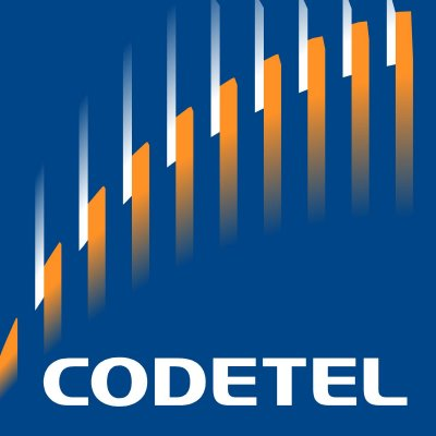 Logo de la Compañía Dominicana de Teléfono antes de ser adquirida por América Móvil (1930-2004).